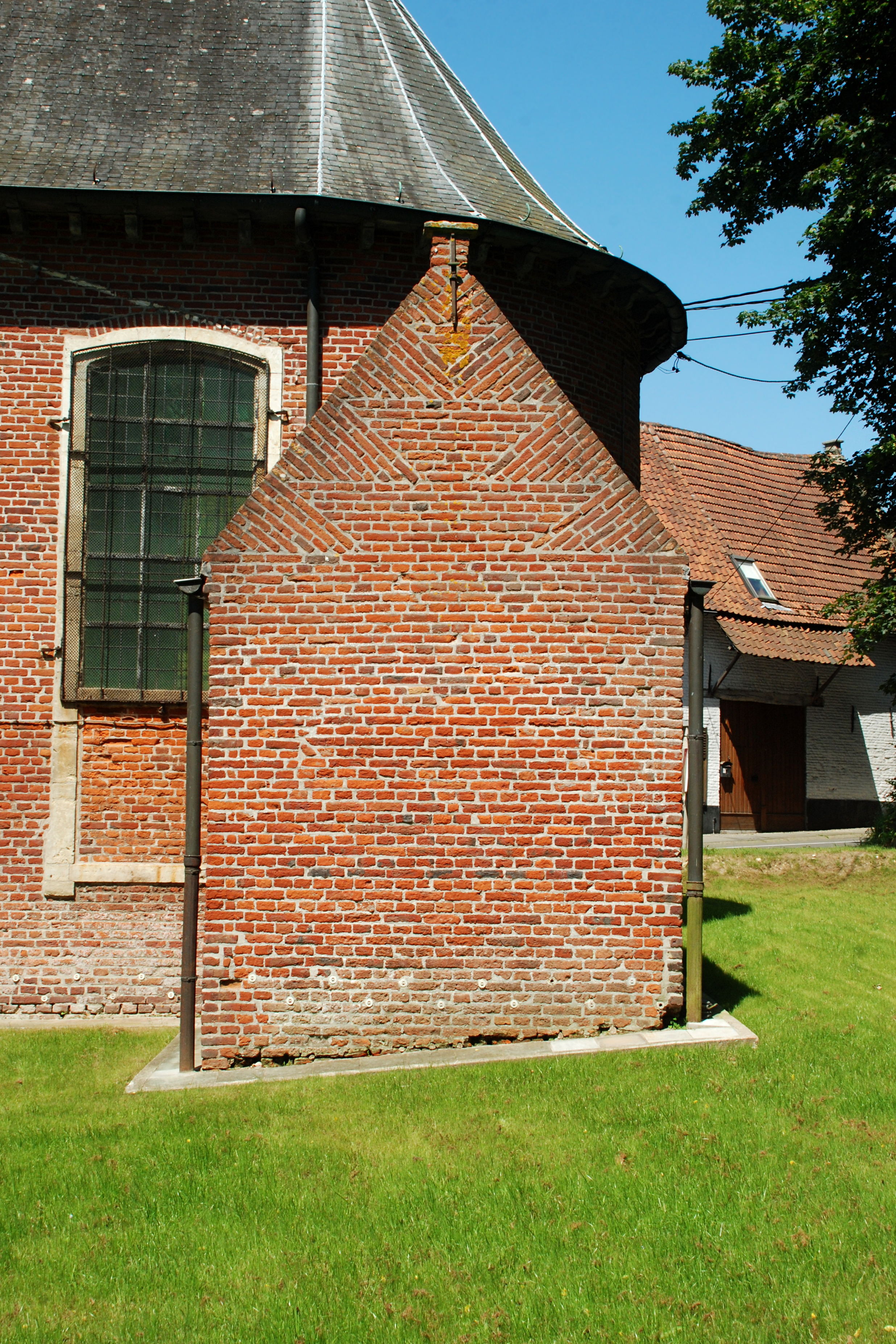 Belgique - Brabant flamand - Huldenberg - Neerijse - Chapelle Notre-Dame ten Pui